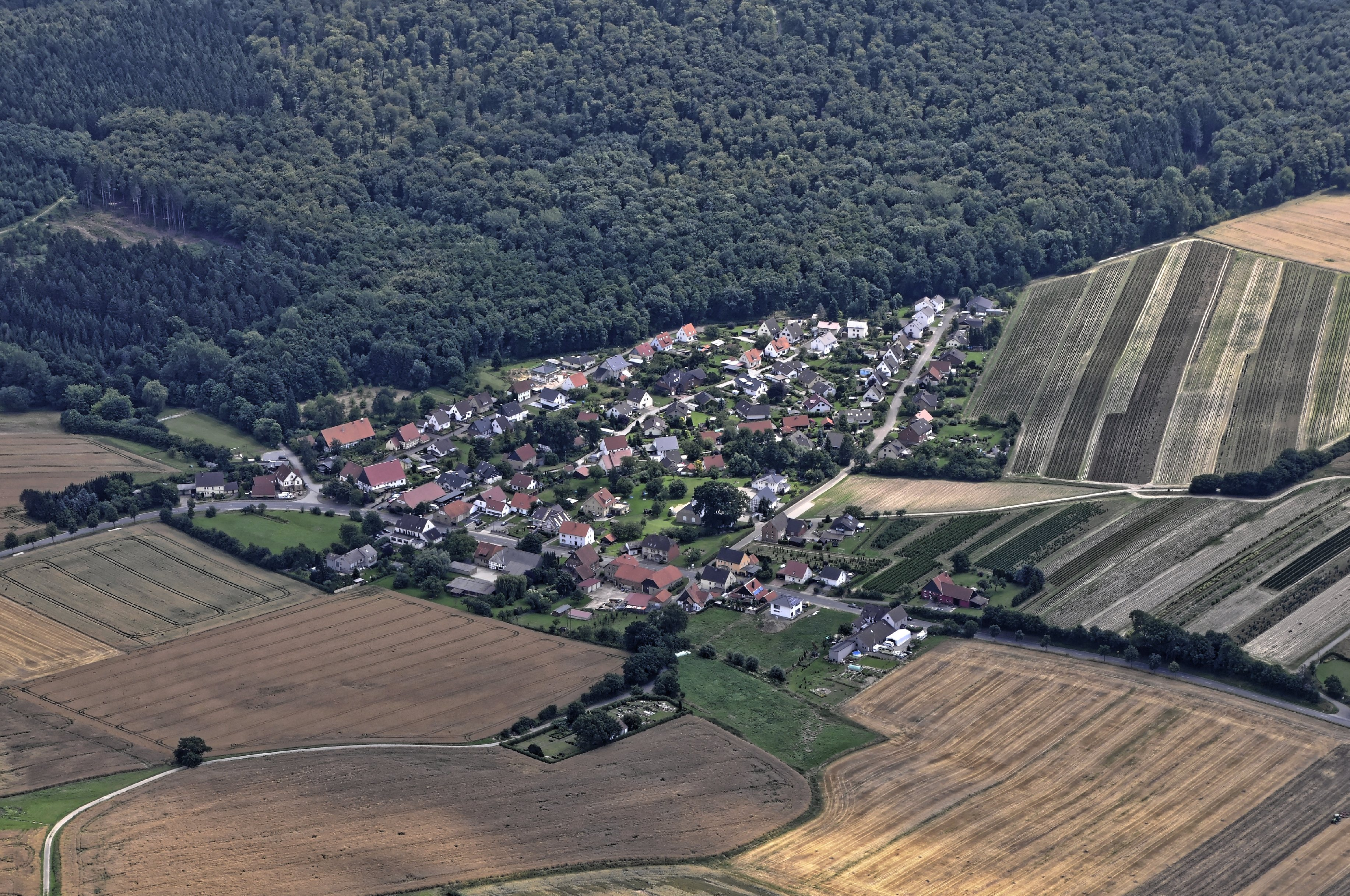 Bilder vom Flug Nordholz-Hammelburg 2015: Selbeck